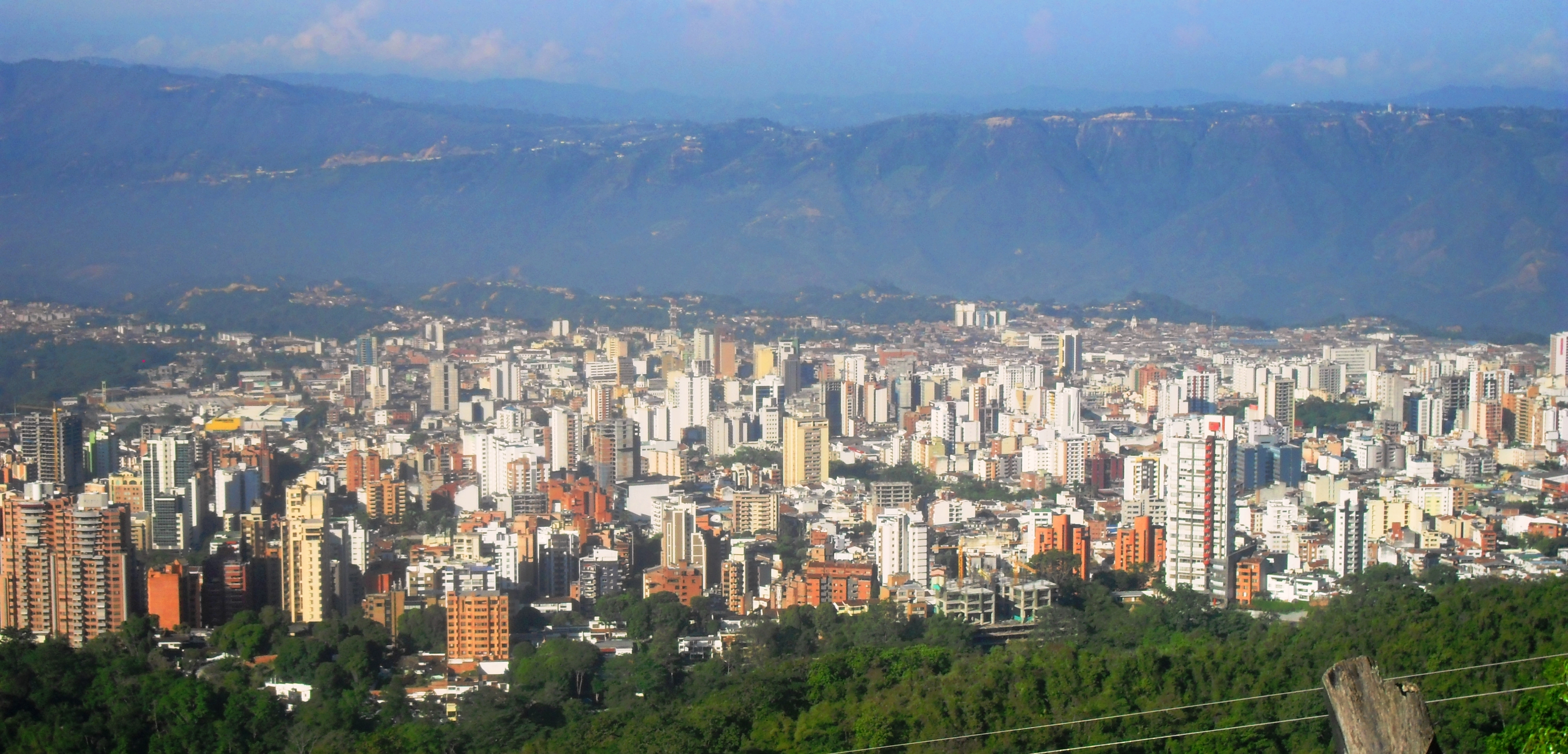 Panoramica de Bucaramanga en la vía a Cúcuta